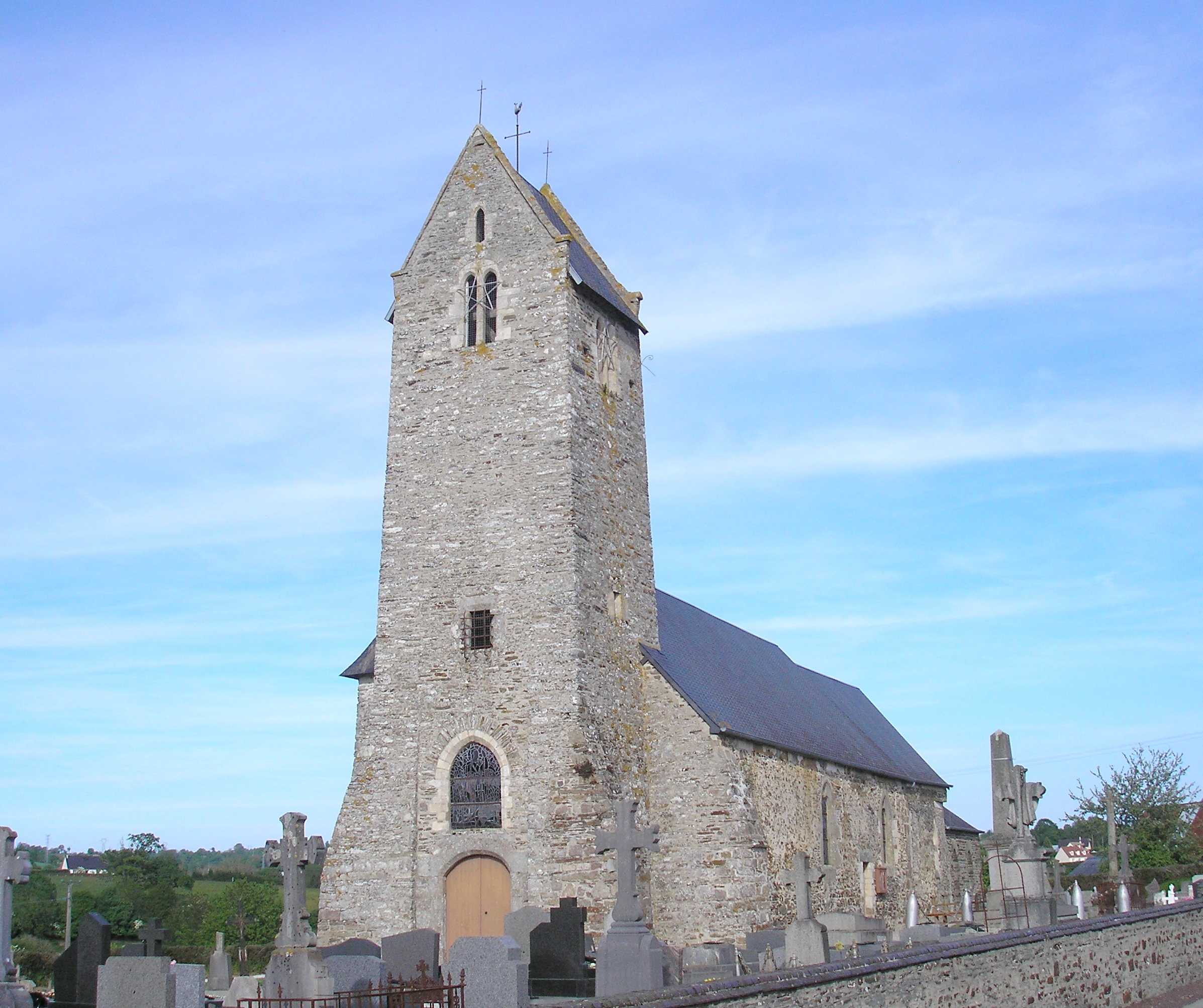 La Mancellière-sur-Vire (Normandie, France). L'église Saint-Jean.